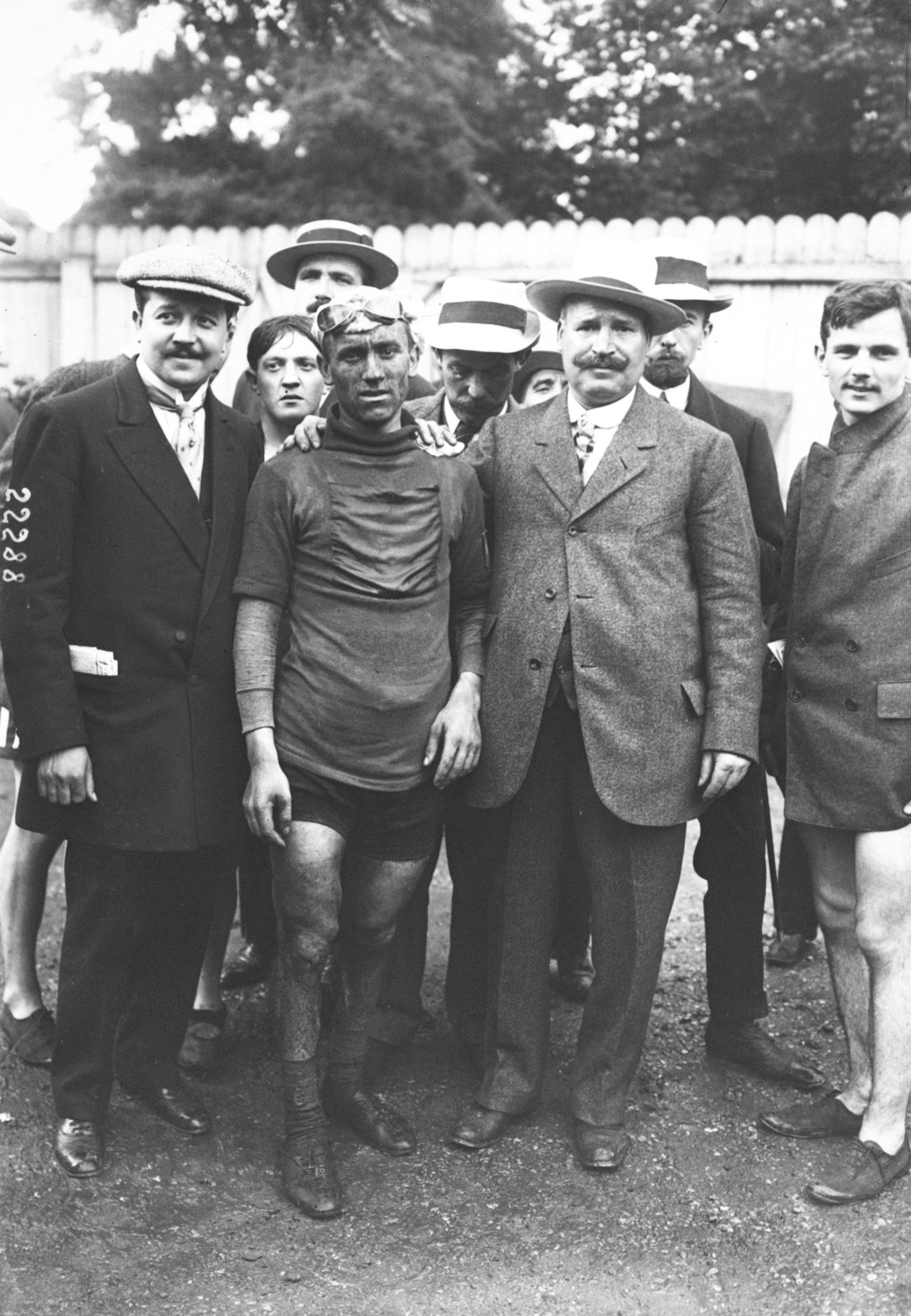 Odiel Defraeye à l'arrivée du Tour de France 1912